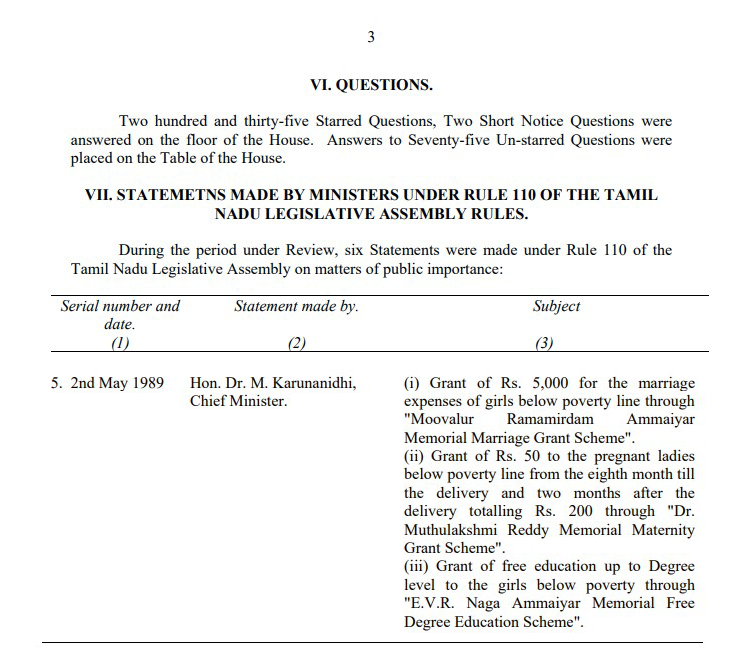 ஒன்பதாவது தமிழக சட்டப்பேரவையின் (1989 - 1991) முதல் கூட்டத் தொடரின் இரண்டாவது அமர்வுகளின் (25-03-1989 - 12-05-1989) நிகழ்வுகள் குறித்து தமிழக சட்டப்பேரவை இணையதளத்தின் ஆவணக்காப்பகப் பக்கத்தில் இடம்பெற்றுள்ளசட்டப்பேரவை குறிப்பேட்டின் (Resume of Business) 3வது பக்கம்.